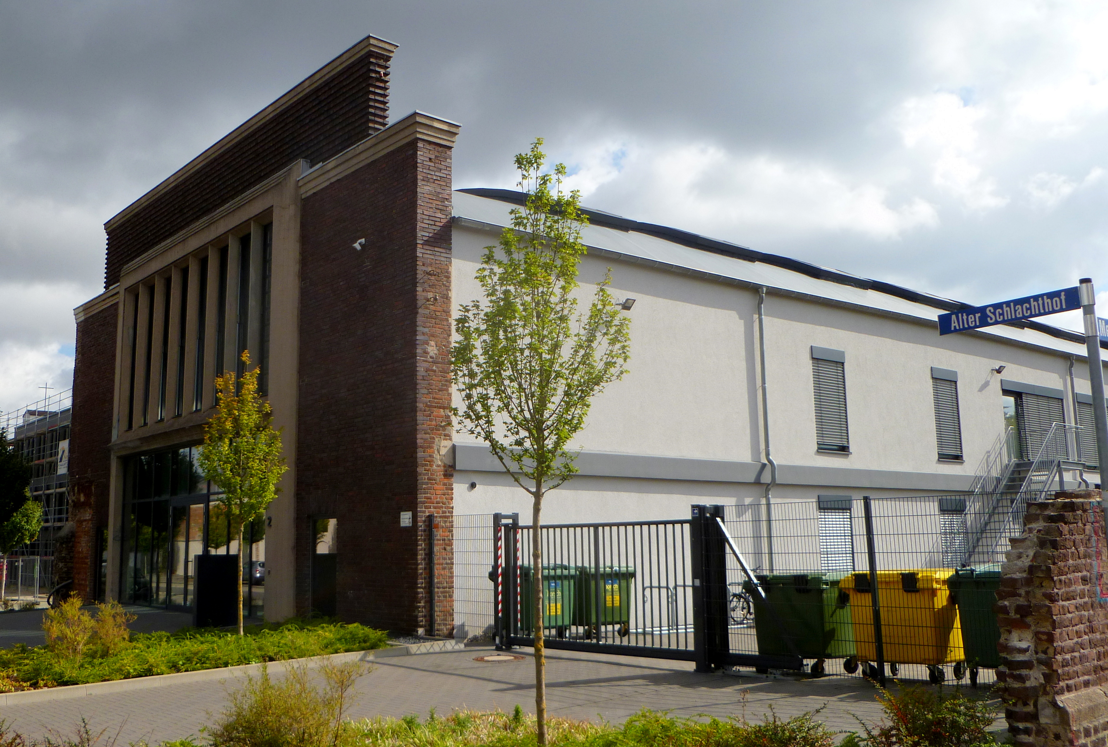 Alter Schlachthof Aachen